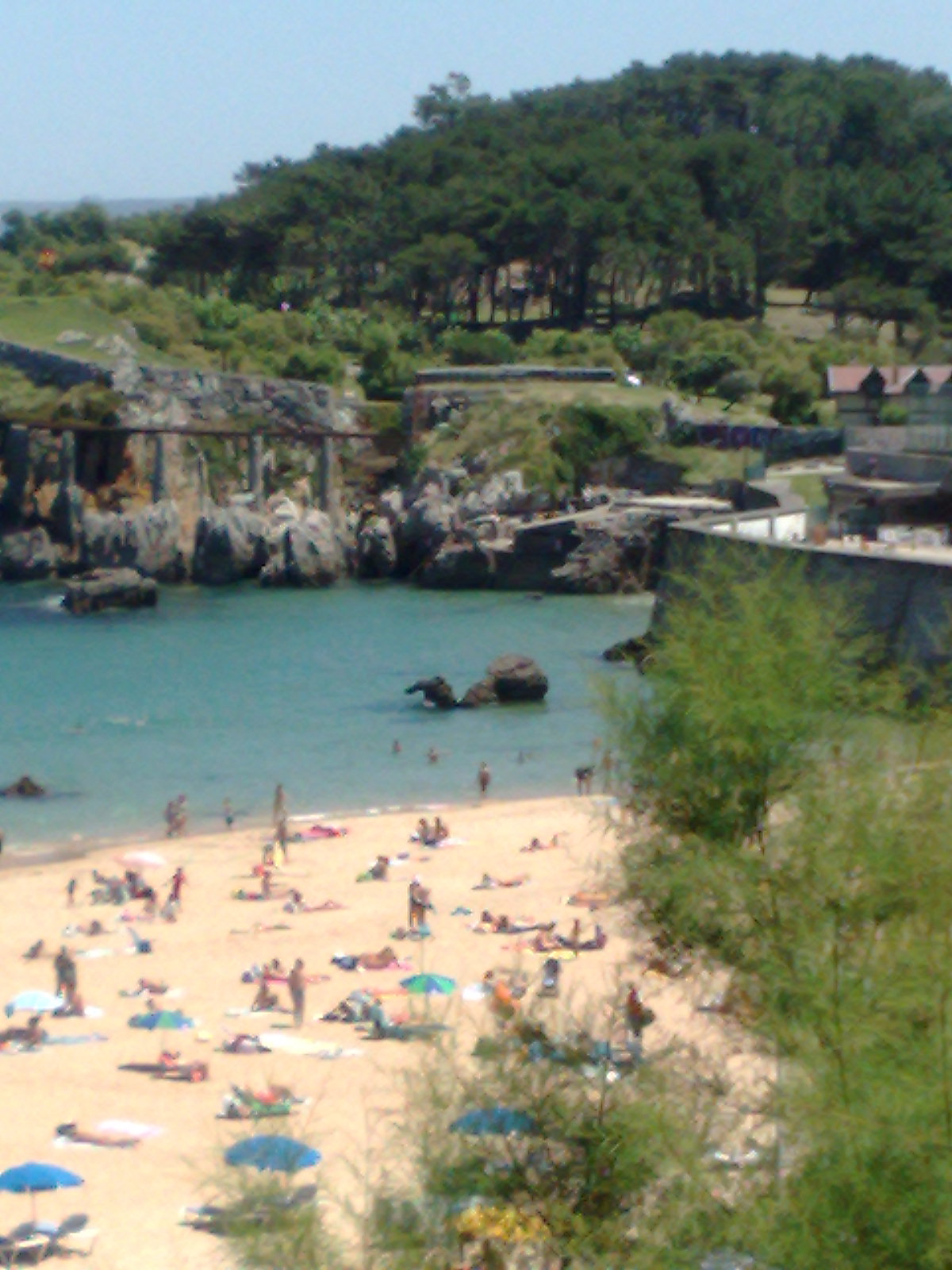 Santander - Sardinero - La playa del camello